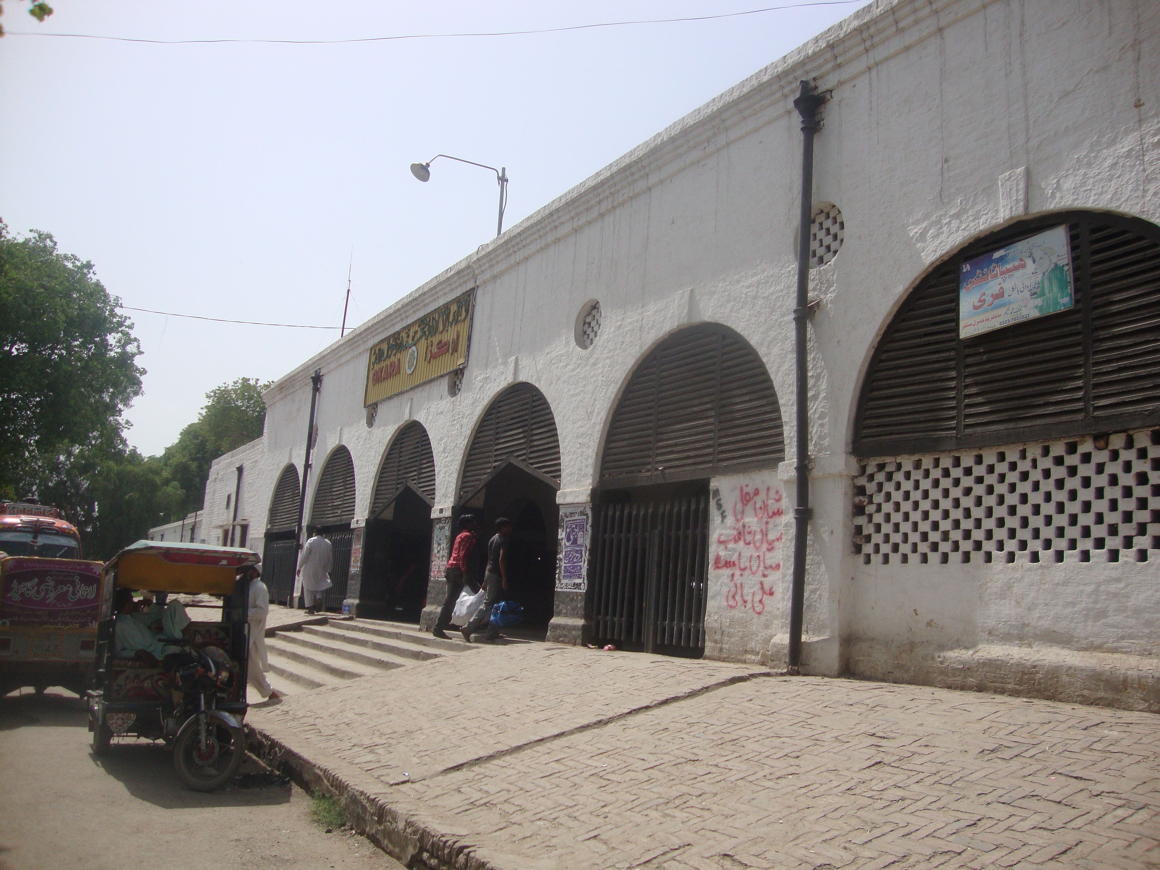 OKARA RAILWAY STATION